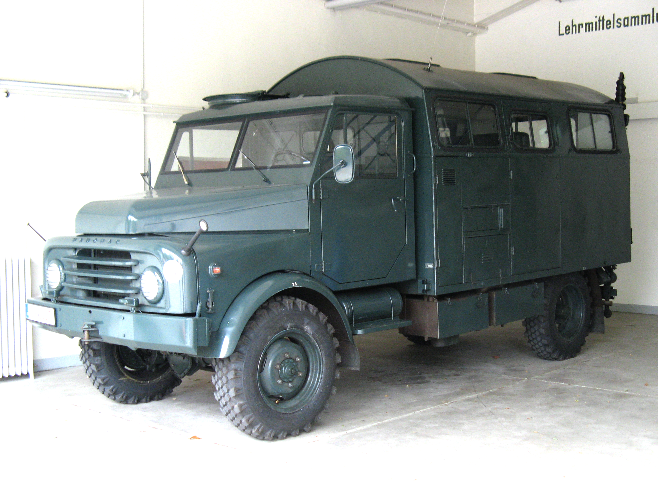 Funkkraftwagen L Hanomag AL 28 (Fukw) des Bundesgrenzschutz. Ausgestellt am Tag der offenen Tür der Bundespolizei (ehemalig Bundesgrenzschutz) anlässlich des 60 Jährigen Jubiläum.